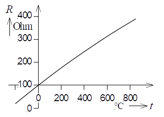 Kennlinie des Pt100-Widerstandsthermometers